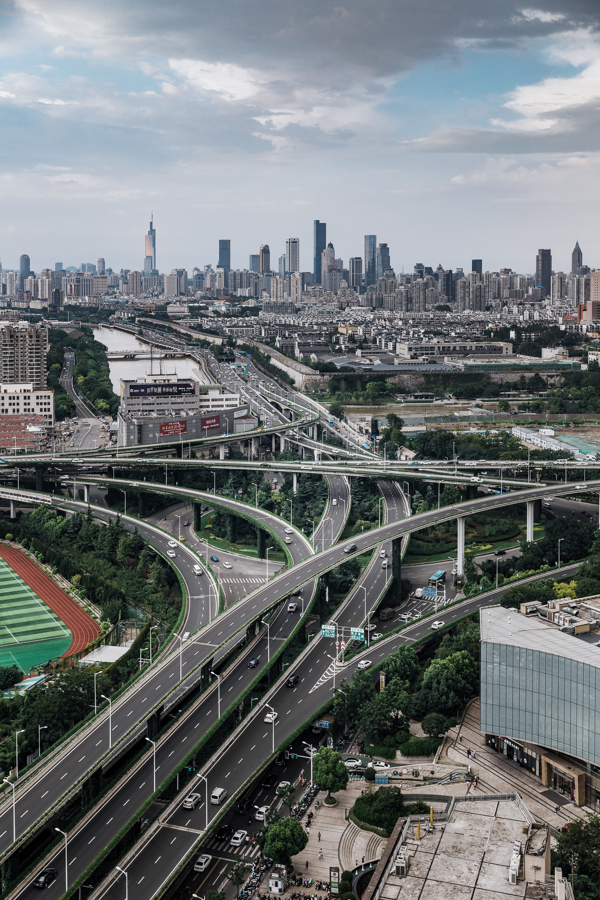 南京赛虹桥立交